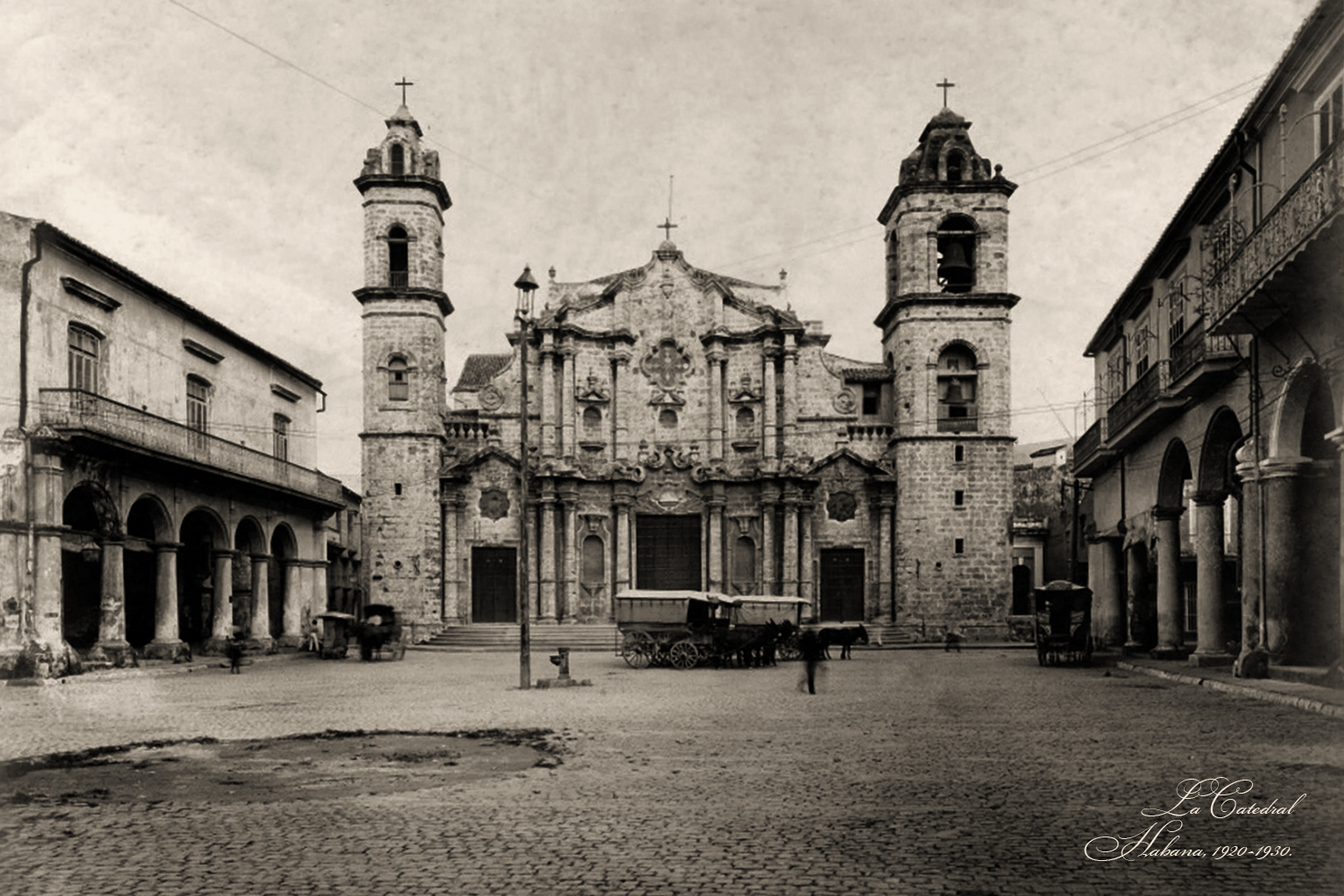 La Catedral, Habana, 1900-1920.